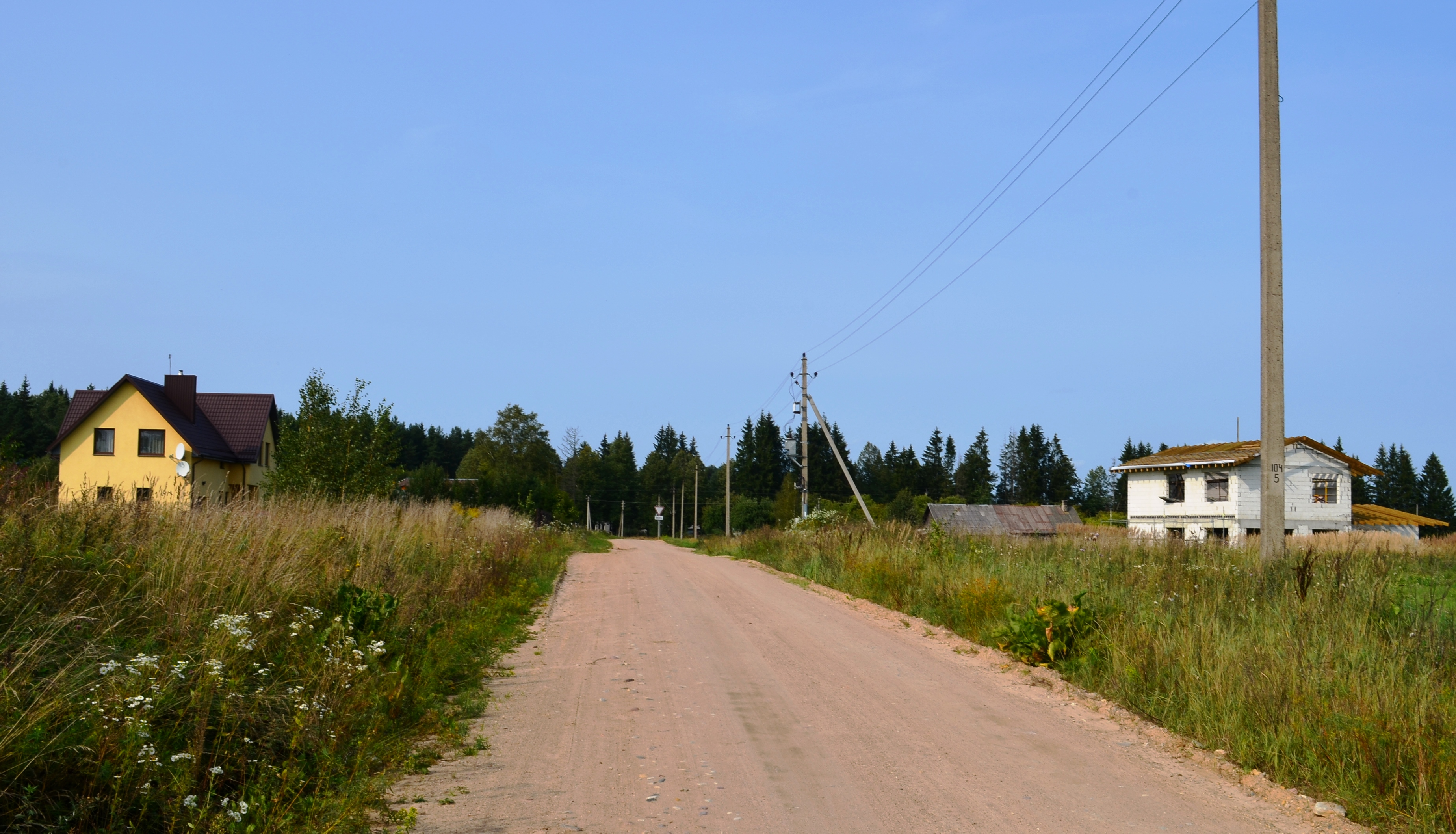 Darželiai, Mickūnų sen., Vilniaus raj.